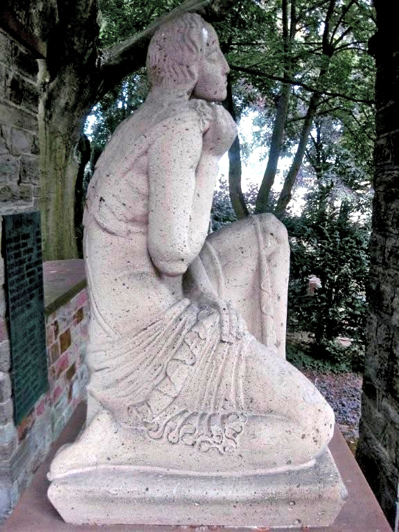 Carl Wilhelm Bierbrauer, „Trauernde“, um 1920, Kriegerdenkmal in Wiesbaden-Medenbach